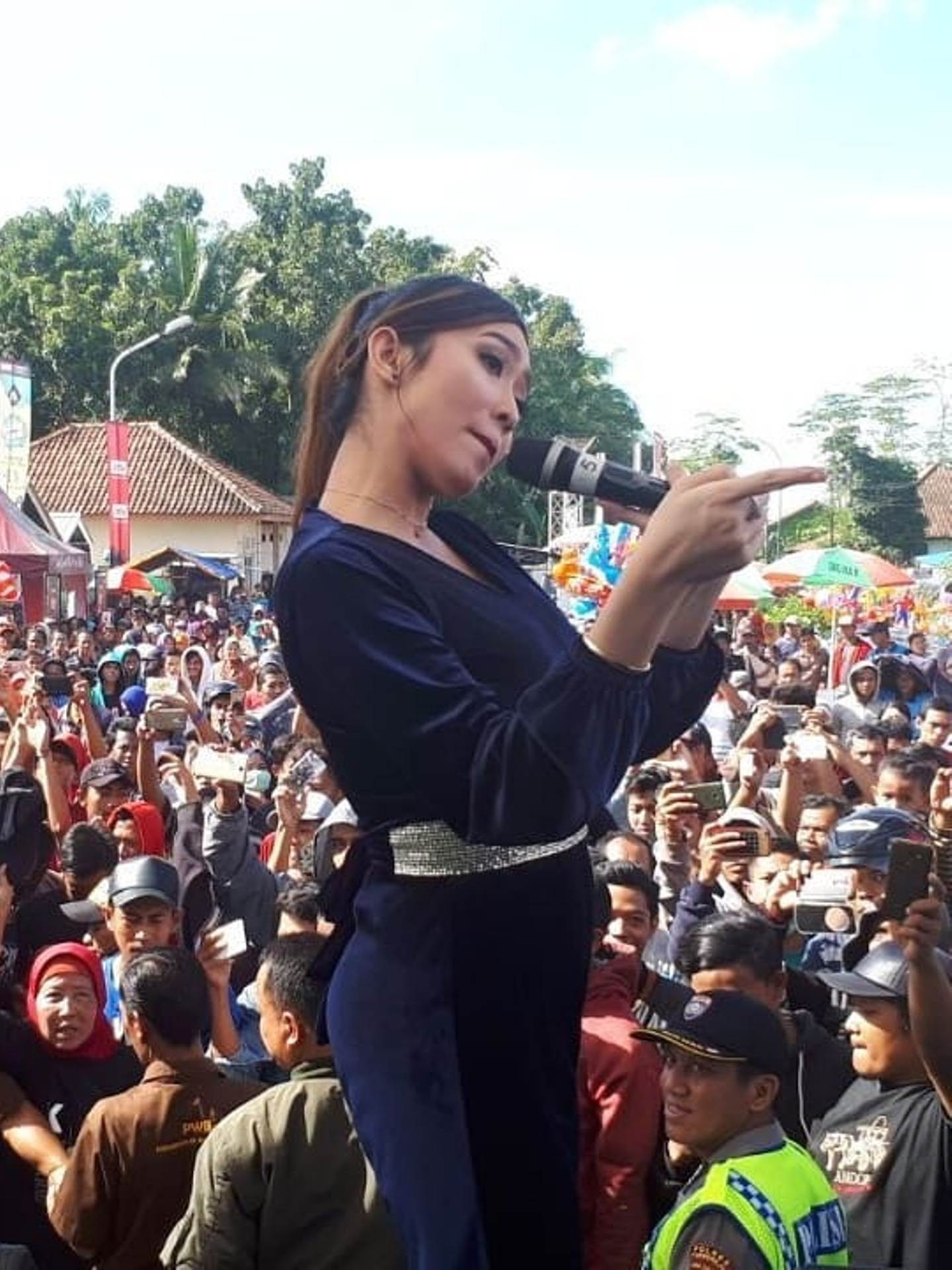 Oza Kioza saat tampil di Pasar Krendetan Purworejo pada Rabu, 28 Februari 2018.